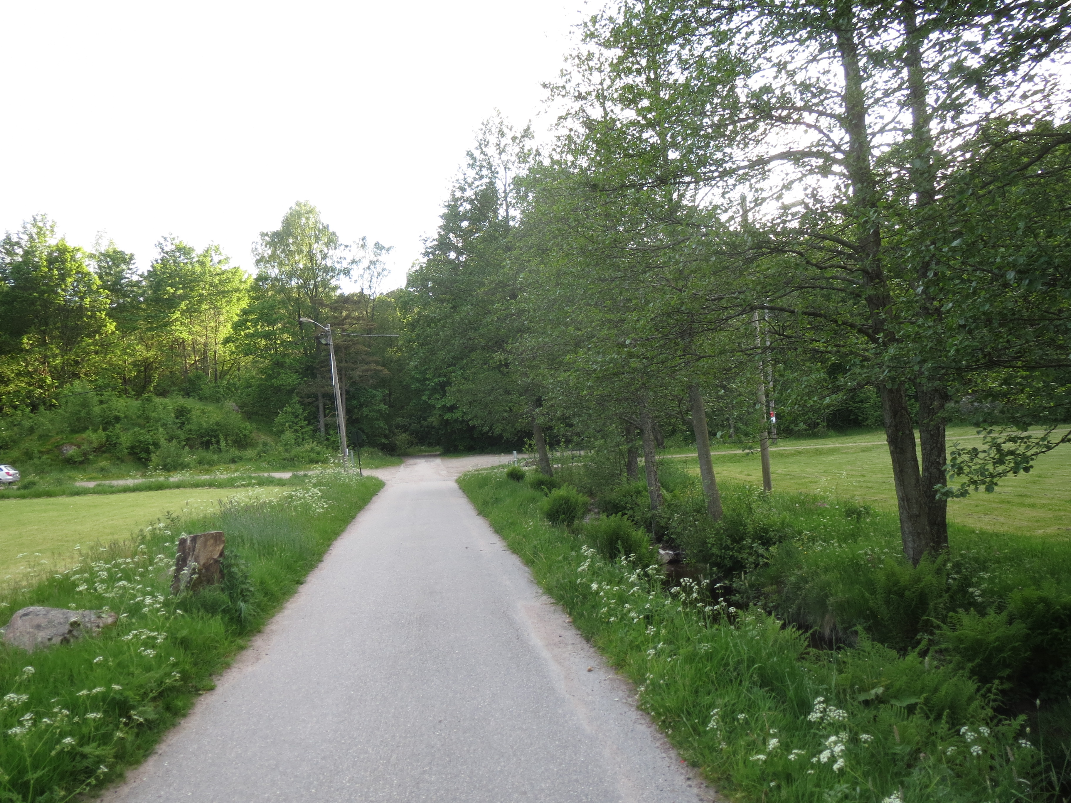 Gamle Mandalsvei i Kristiansand ved Kjærrane